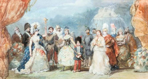 Aquarelle et gouache - 20 × 37,5 cm, collection du château de Compiègne (2019)